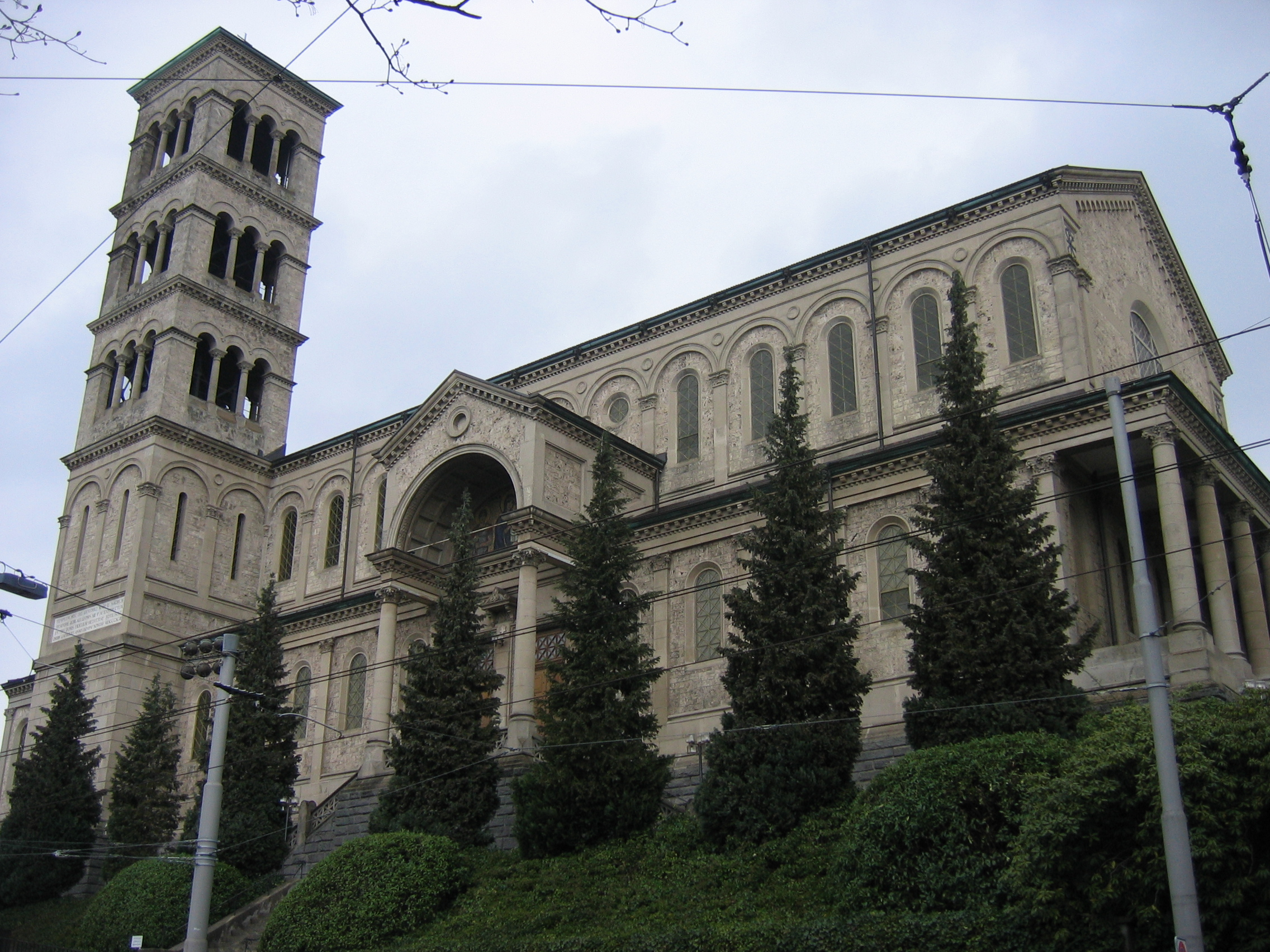 Kath. Liebfrauenkirche zu Zürich